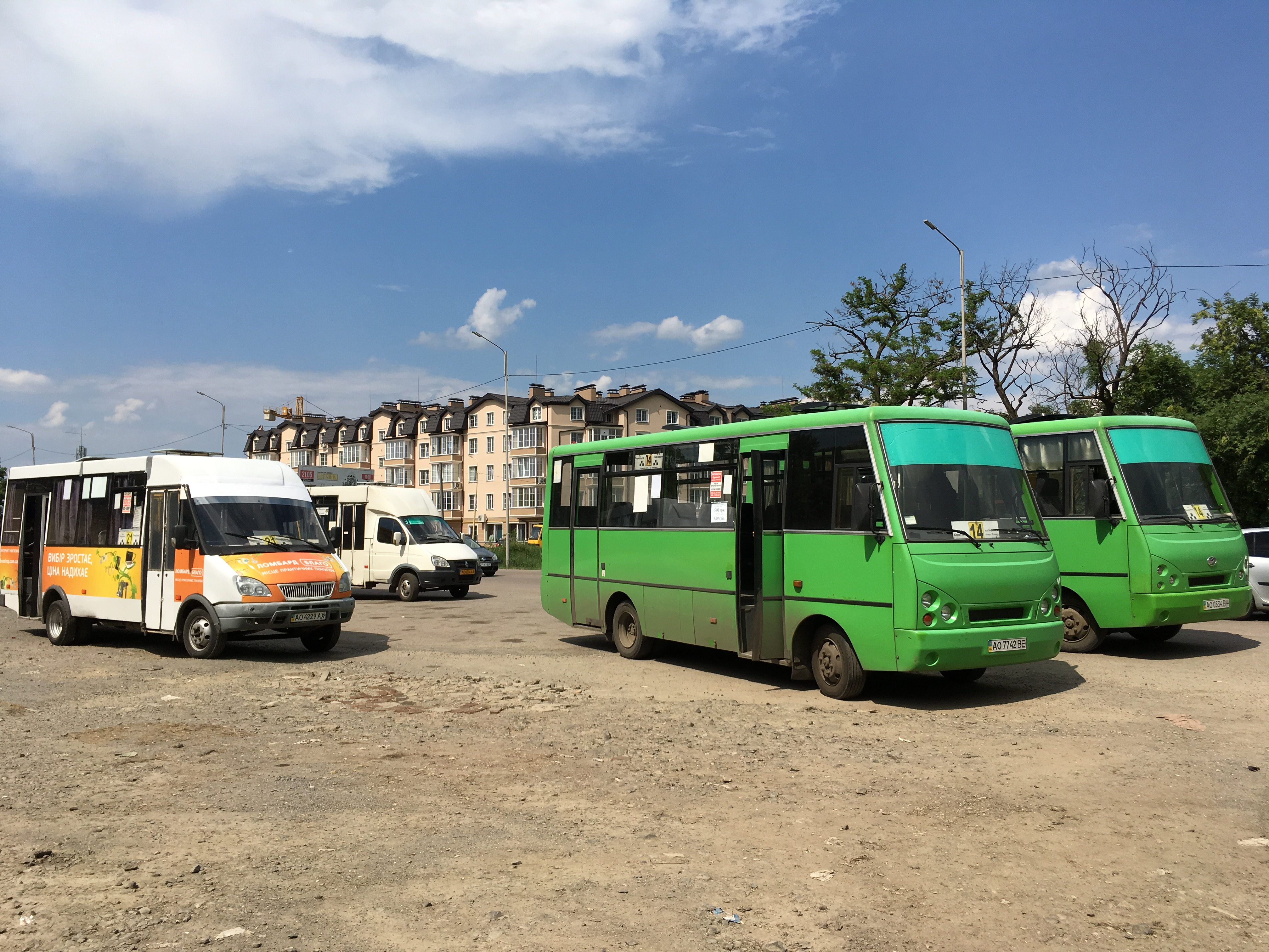 Temporary parking place for marshrutkas which have last stop on Chornovola Street